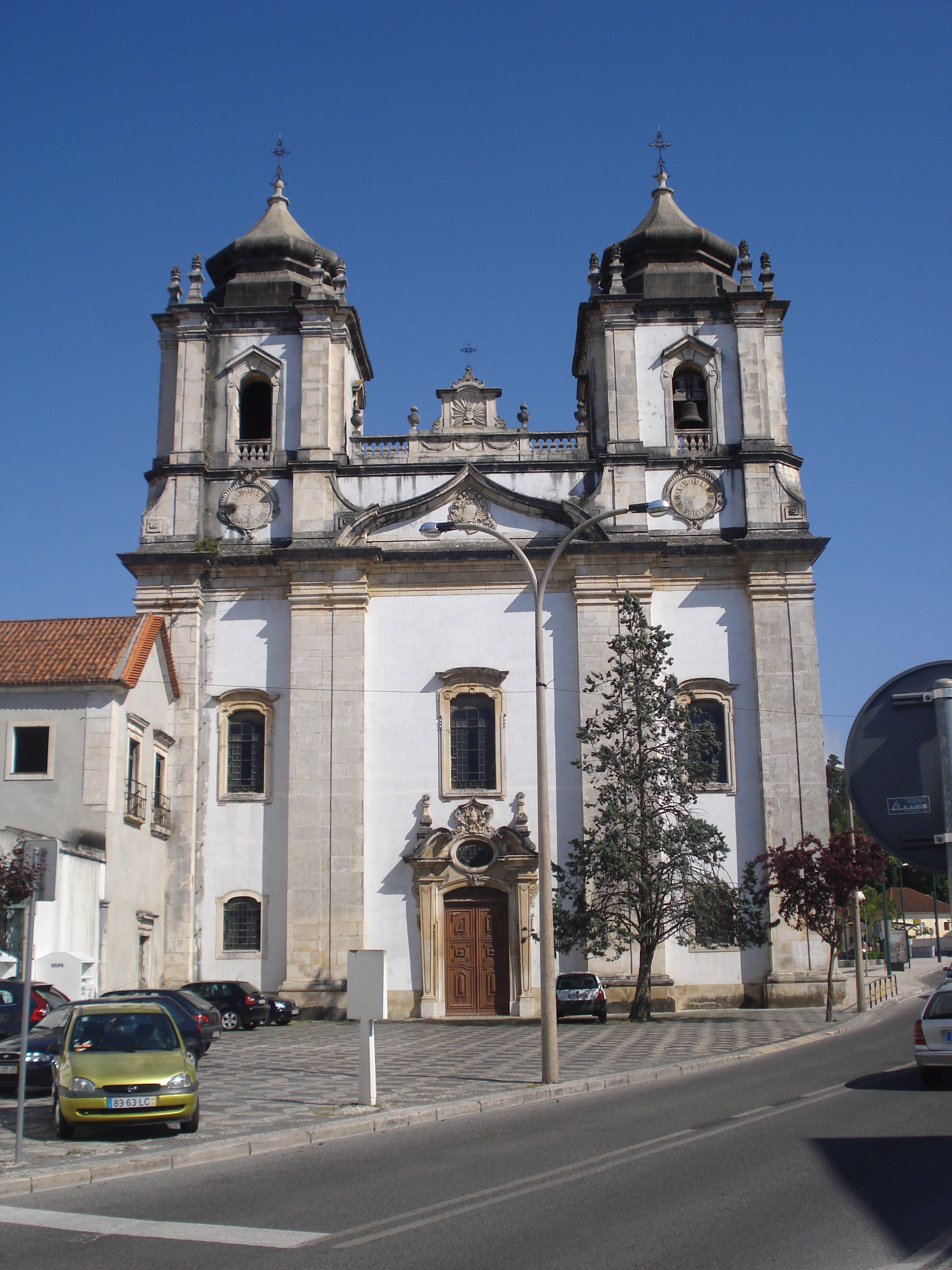 Fachada frontal da Igreja de Santo Agostinho (vista oeste). À esquerda, o convento de Santo Agostinho.